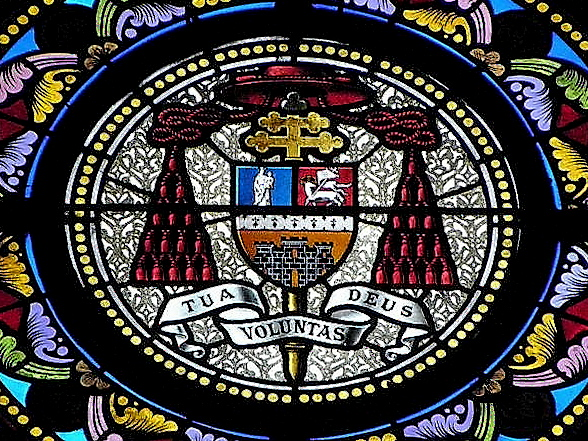 Armes de Charles-Philippe Place. Basilique Notre-Dame-de-Bonne-Nouvelle de Rennes (35).